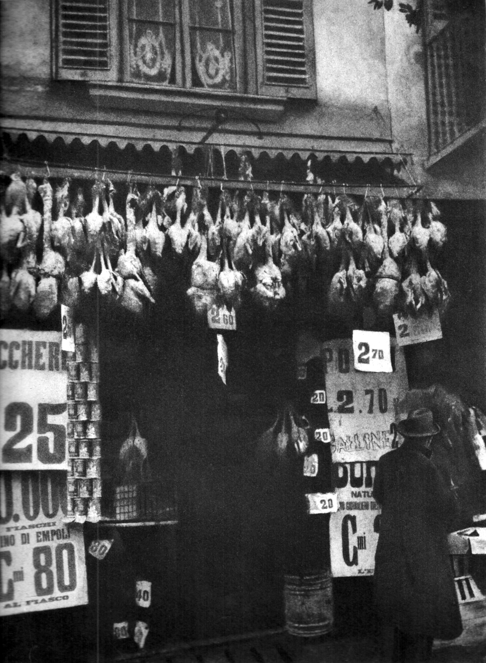 autore:anonimo fonte:Civica raccolta fotografica Milano descrizione: pollame esposto in una salumeria di via Spadari a Milano (1930) licenza d'uso: foto non artistica scattata in Italia oltre 20 anni fa note